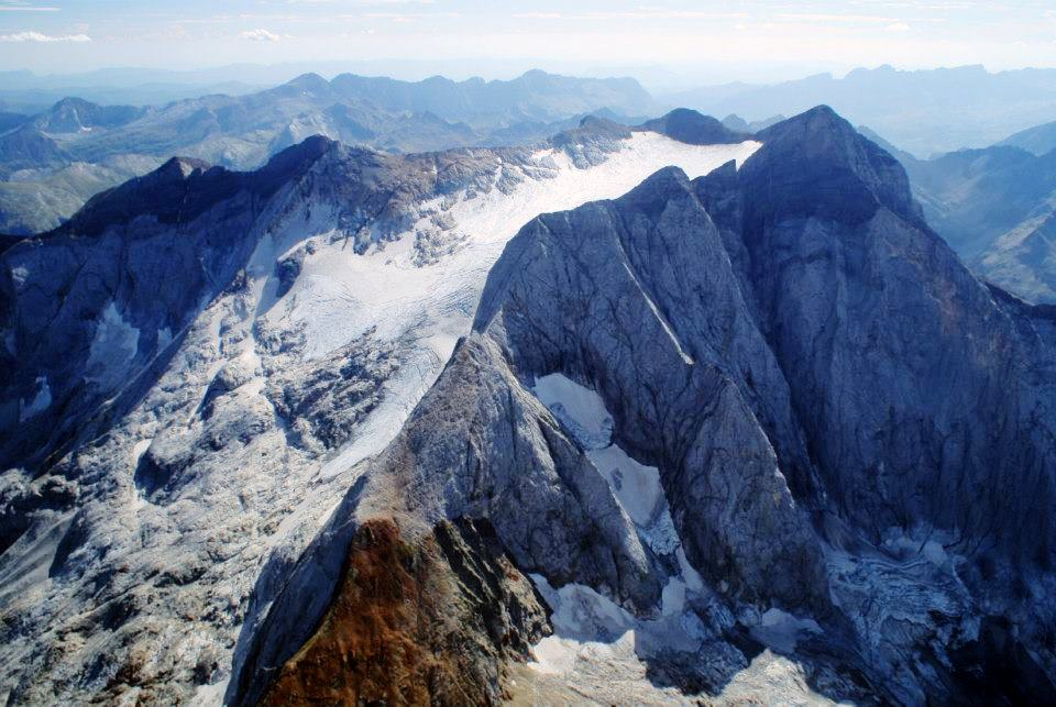 Vignemale et ses glaciers d'Ossoue et des oulettes de Gaube vue d'avion